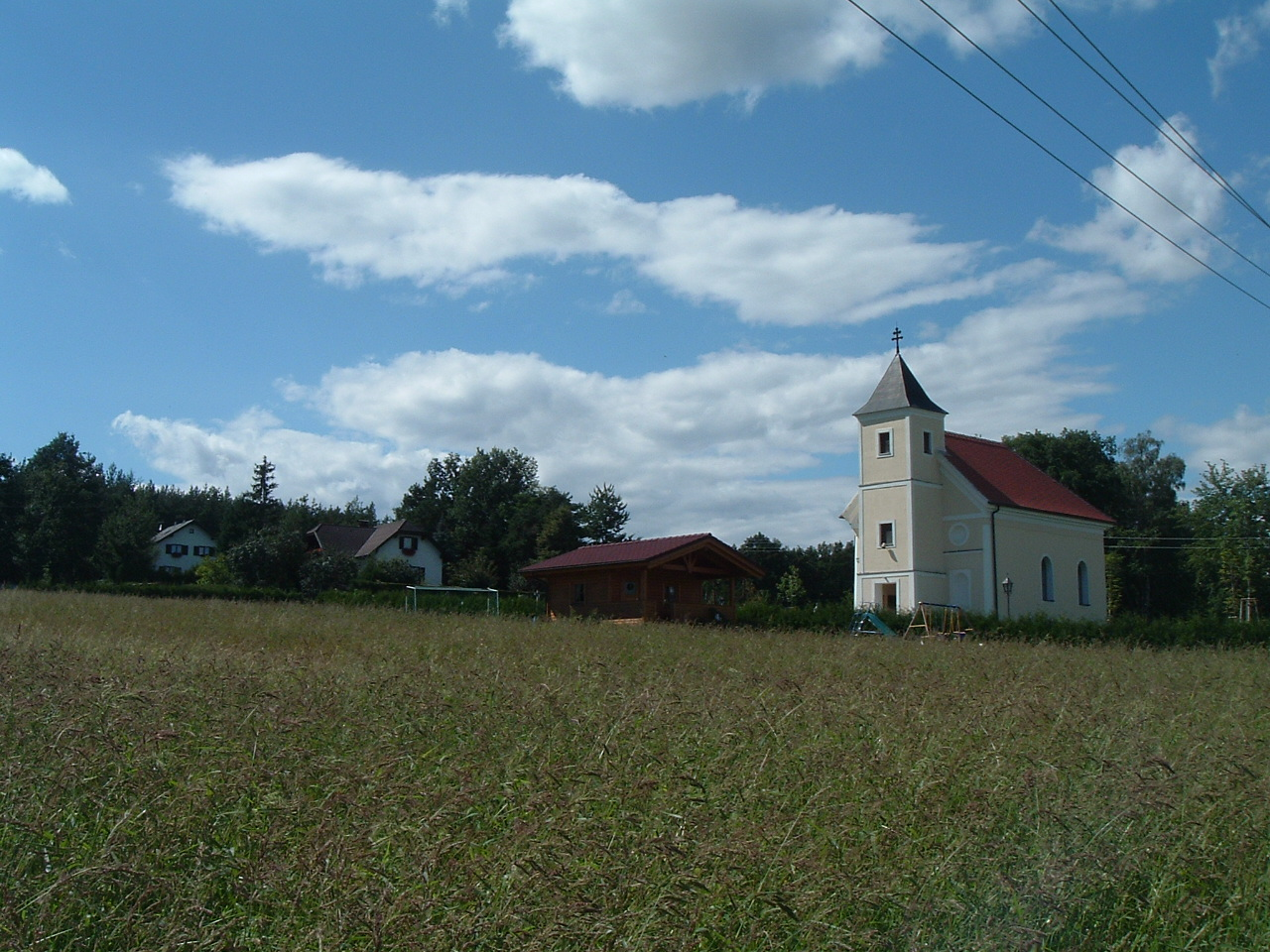 Church of Allersdorf, Burgenland, Austria